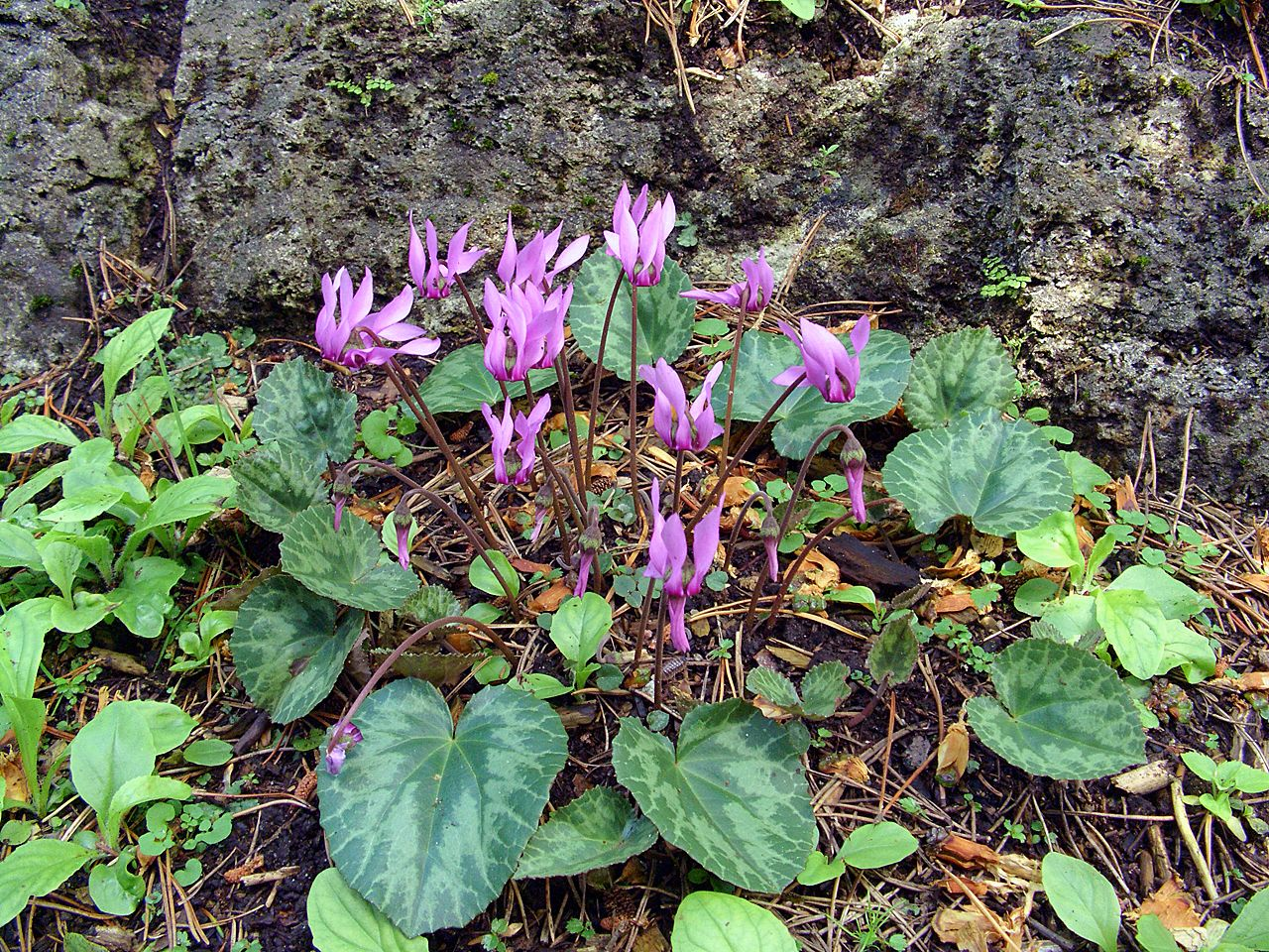 Cyclamen purpurascens - plants